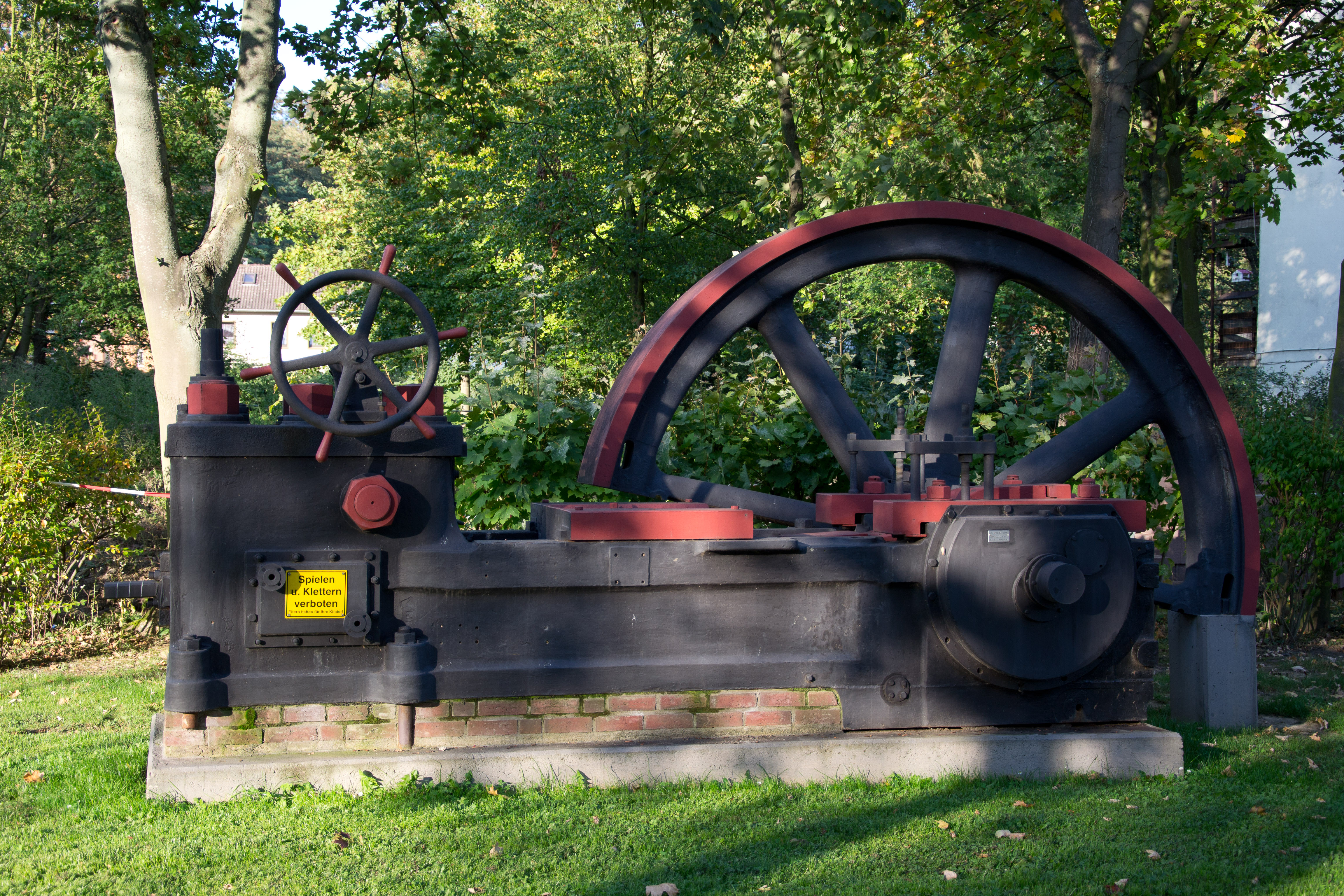 Einstrang Exterpresse, Köln-Aachener-Strasse, aus der Gründerzeit der Brikettierung im Rheinischen BraunkohlerevierThis is a photograph of an architectural monument.